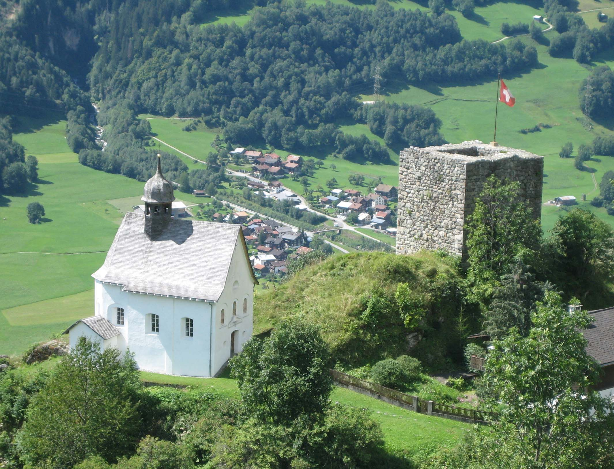 Turm und Kirche Sta Maria dalla Neiv